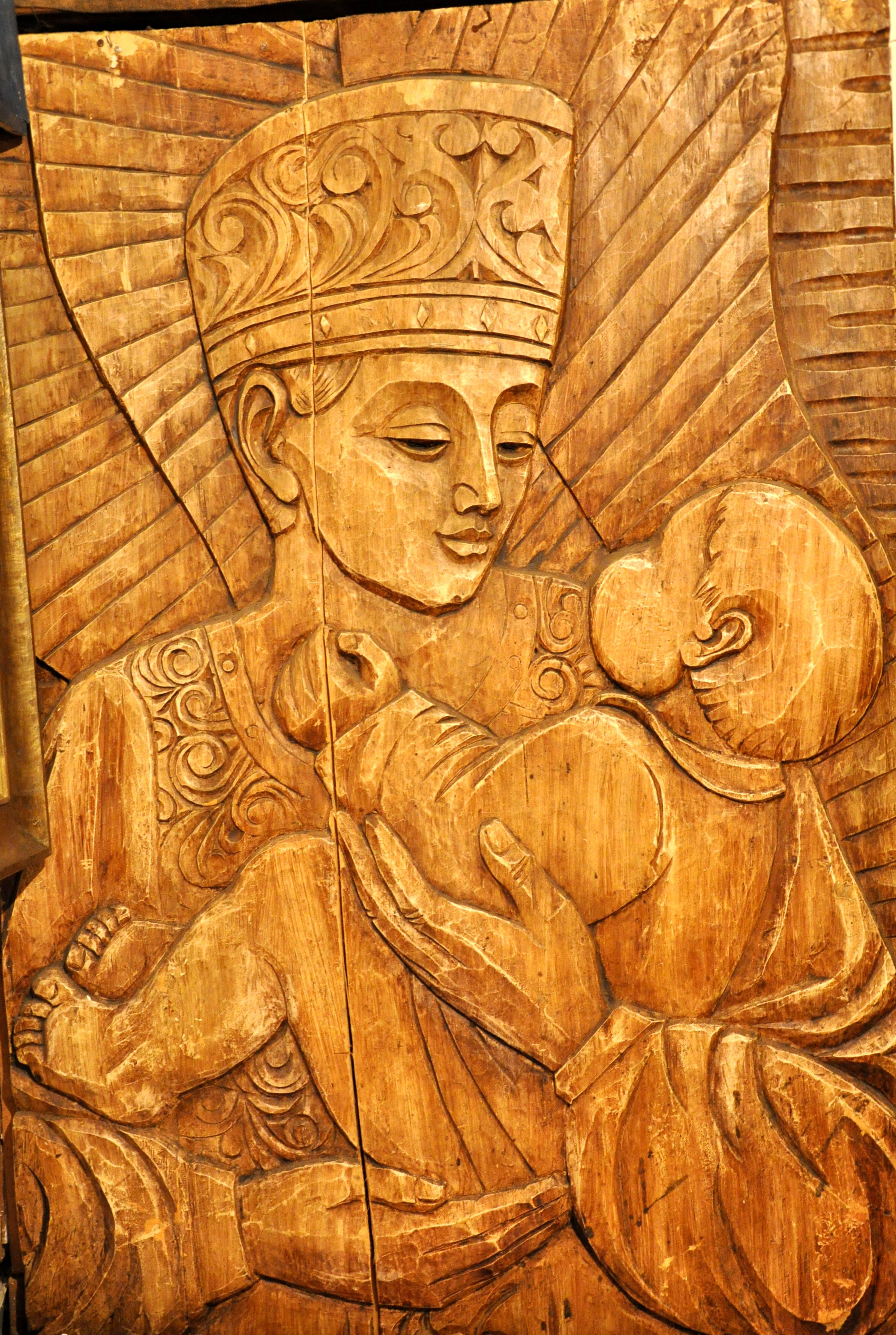 оформление Кольской АЭС